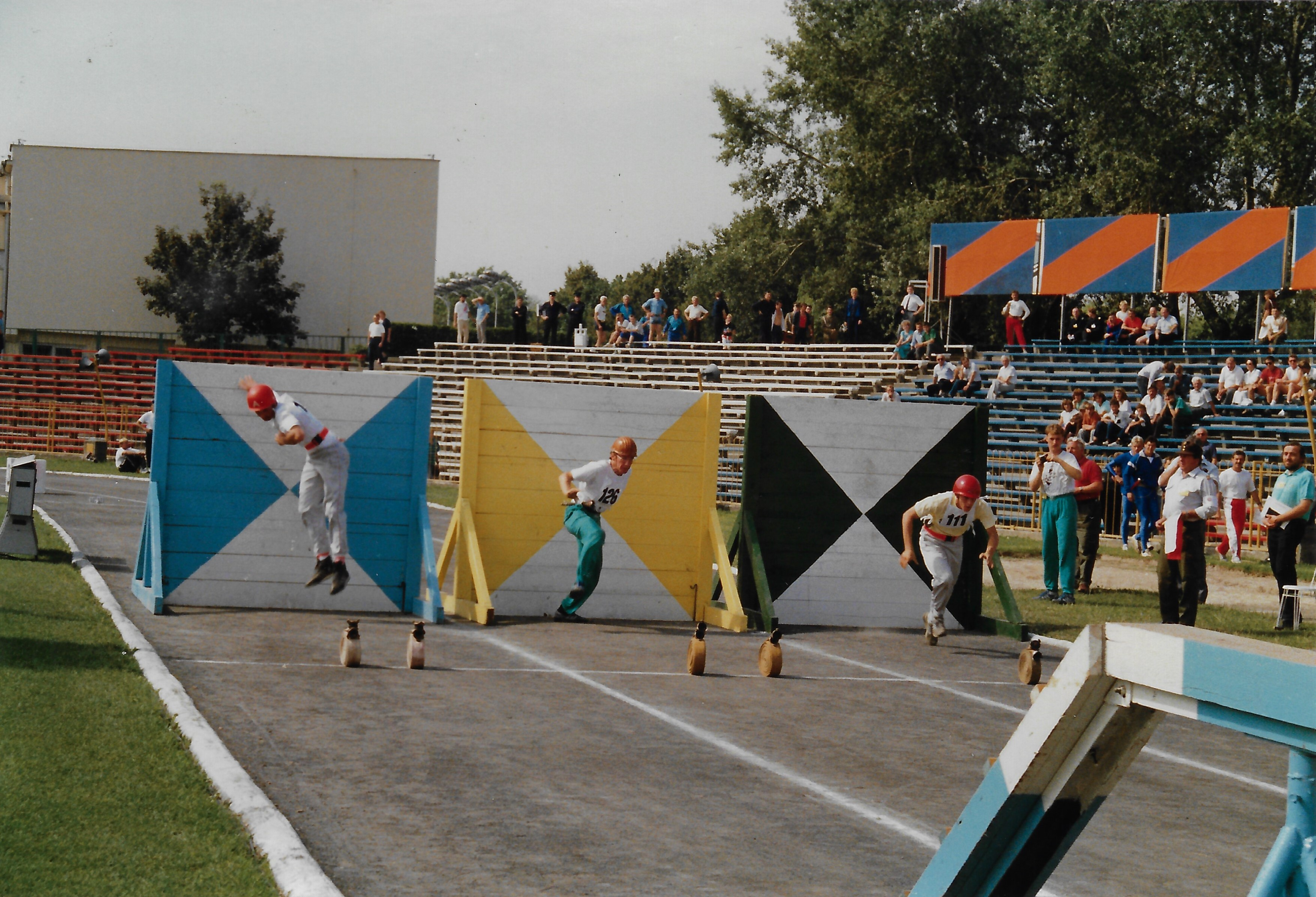 IX. Internationale Feuerwehrsportwettkämpfe 1989 in Warschau, Disziplin 100m-Hindernislauf - Freiwillige Feuerwehren